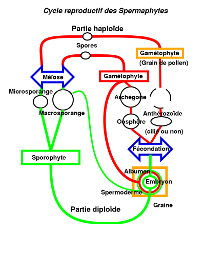 cycle reproductif des spermaphytes